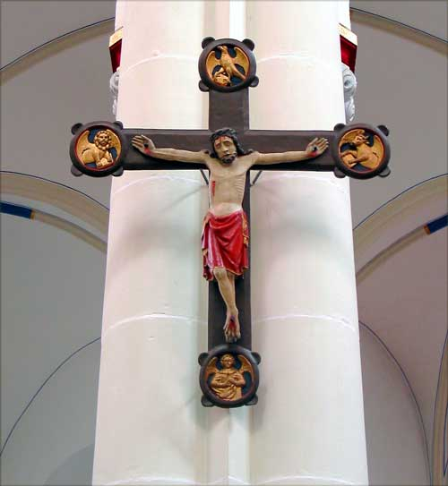 St. Johannes Bapt. Neheim, Triumpfkreuz